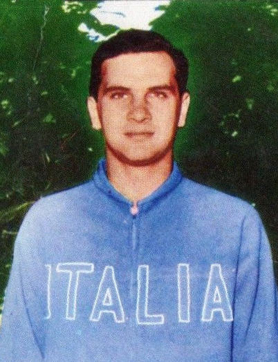 CAMPIONI dello SPORT 1966/67-Figurina n.398- LA RAGIONE - SCHERMA -Rec